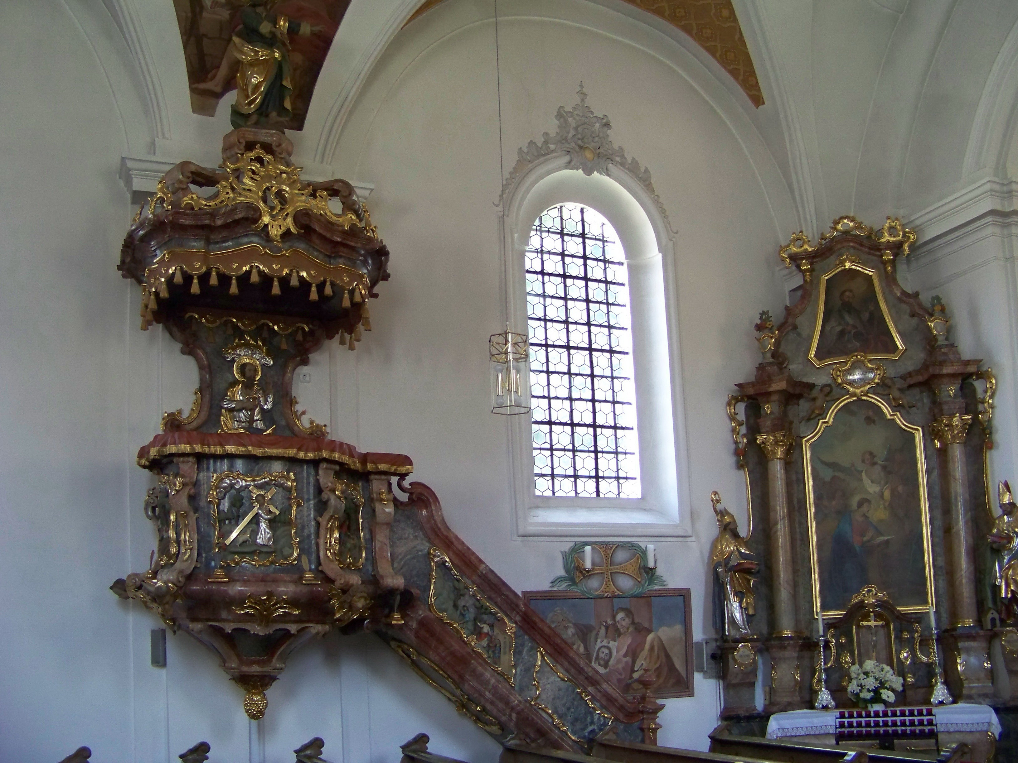 Unterneuhausen, Kirchweg 9. Saalkirche mit Westturm, barocke Anlage von 1741, mit Lisenengliederung. Kanzel an der nördlichen Langhauswand mit Voluten und reichem Rokokomuschelwerk. An der Rückwand Relief des Apostels Paulus.